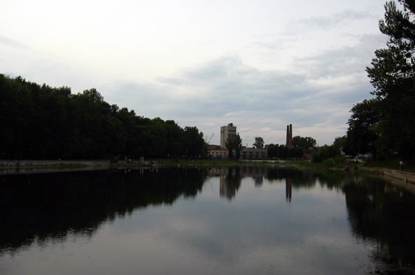 Левандовское озеро Во Львове. В Левандовском парке.